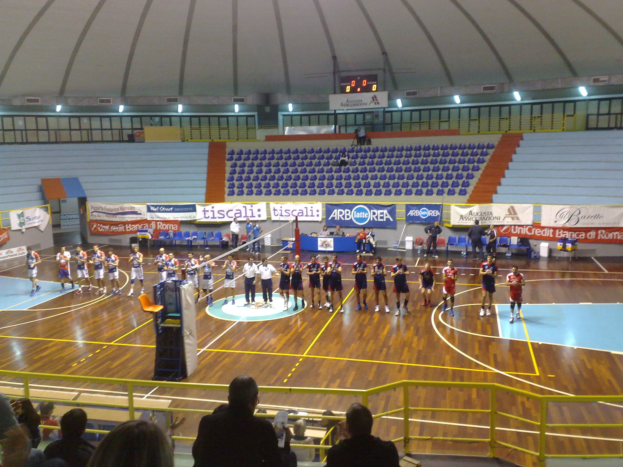 Ingresso in campo dei giocatori di Cagliari e Bergamo nel campionato di Serie B1 2009-2010 di pallavolo.